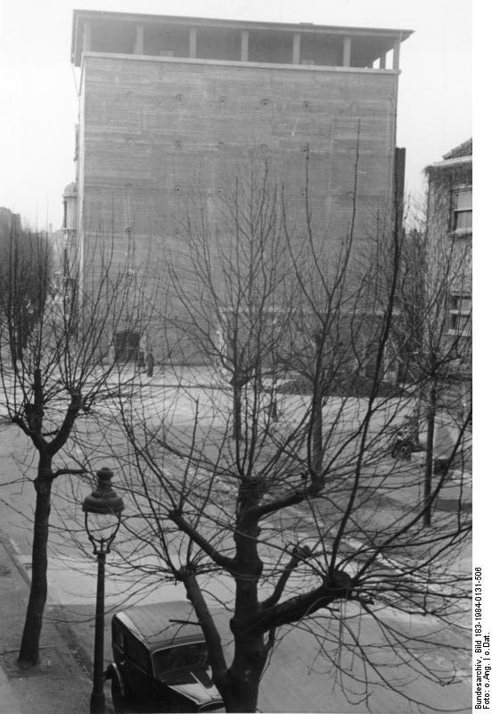 Ein Luftschutz-Hochbunker im Ruhrgebiet Ein wahrhaftiges Monument der Sicherheit ragt der Hochbunker über die Häuser "seines" Stadtviertels, bereit, jederzeit die ganze umwohnende Bevölkerung aufzunehmen.